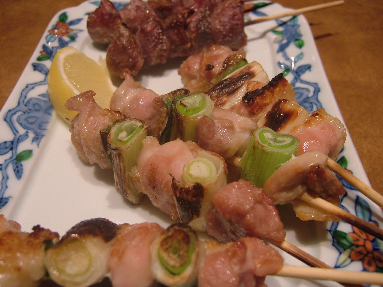 NegimaNegima [ねぎま（焼き鳥）]